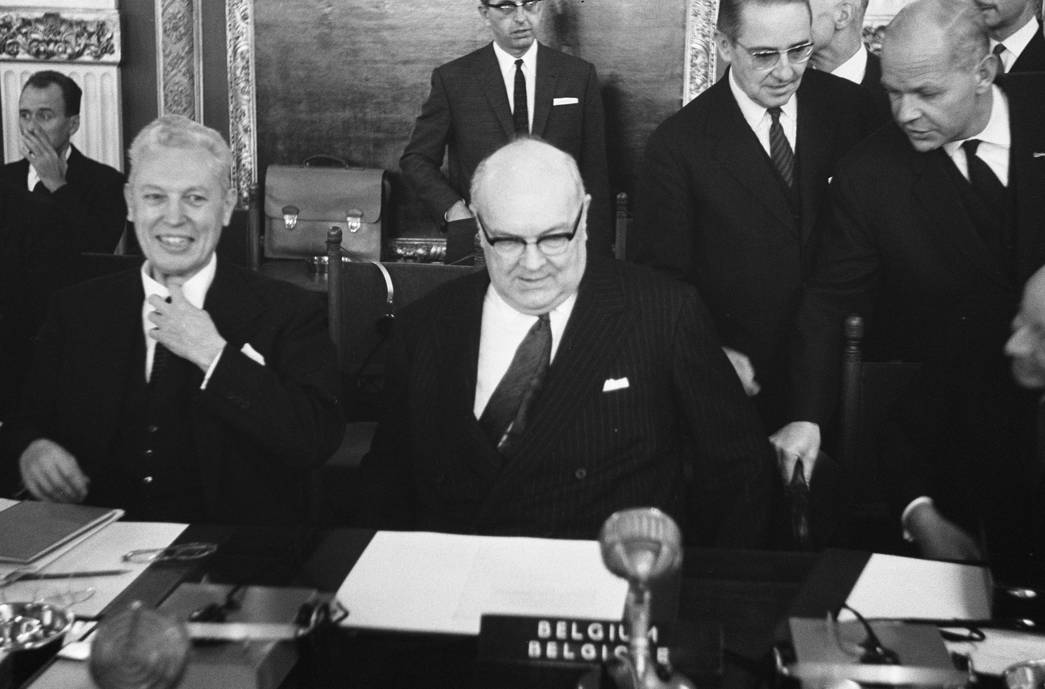 Collectie / Archief : Fotocollectie Anefo Reportage / Serie : [ onbekend ] Beschrijving : Ministersconferentie van de West Europese Unie in Den Haag begonnen. Minister Spaak Datum : 25 oktober 1963 Locatie : Den Haag, Zuid-Holland Trefwoorden : conferenties, ministers Persoonsnaam : Spaak, Paul-Henri Fotograaf : Pot, Harry / Anefo Auteursrechthebbende : Nationaal Archief Materiaalsoort : Negatief (zwart/wit) Nummer archiefinventaris : bekijk toegang 2.24.01.05 Bestanddeelnummer : 915-6680